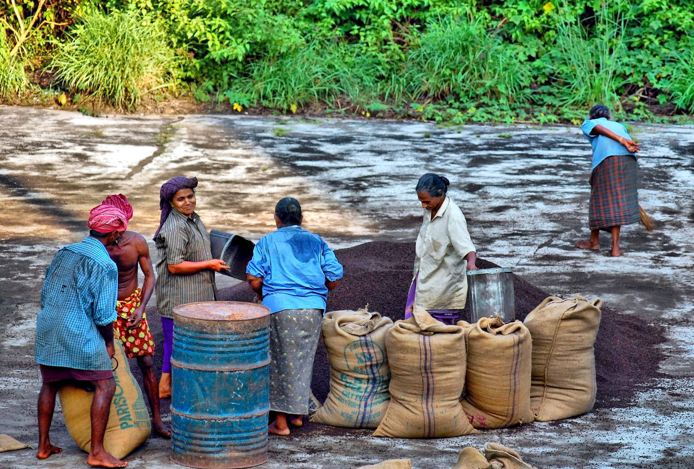 നാടൻ കുരുമുളക് സംഭരണകേന്ദ്രം